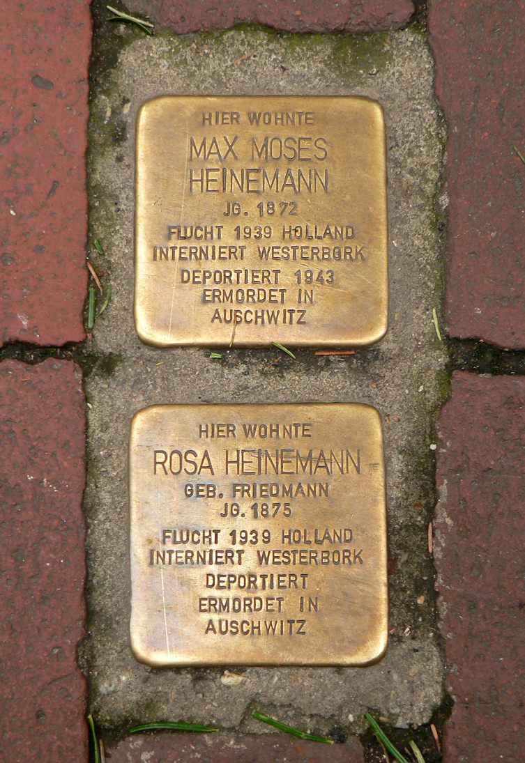 Stolperstein für Max Moses und Rosa Heinemann in Hannover